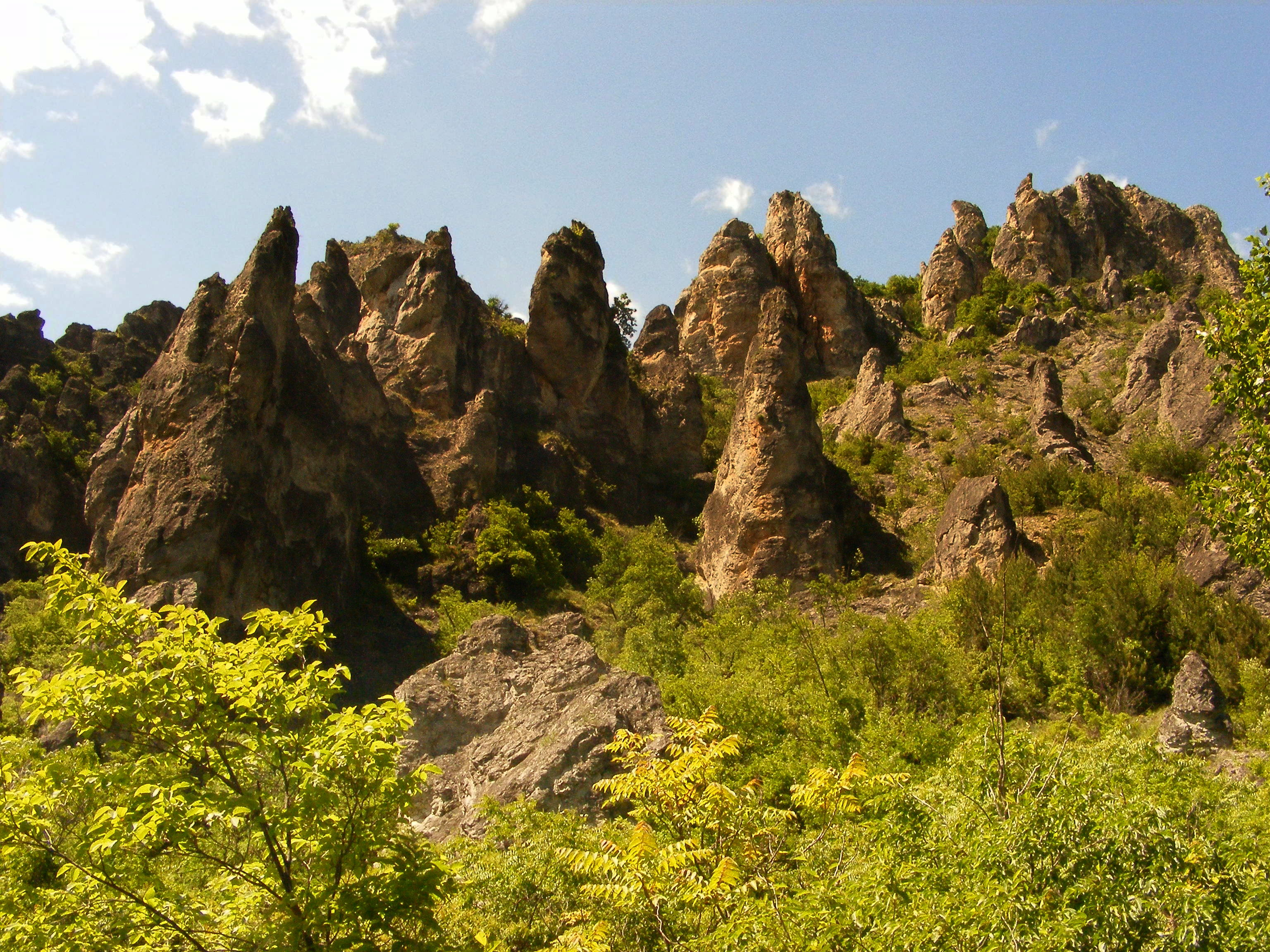 Скални образувания в каньона на река Шегава, край село Раждавица, България